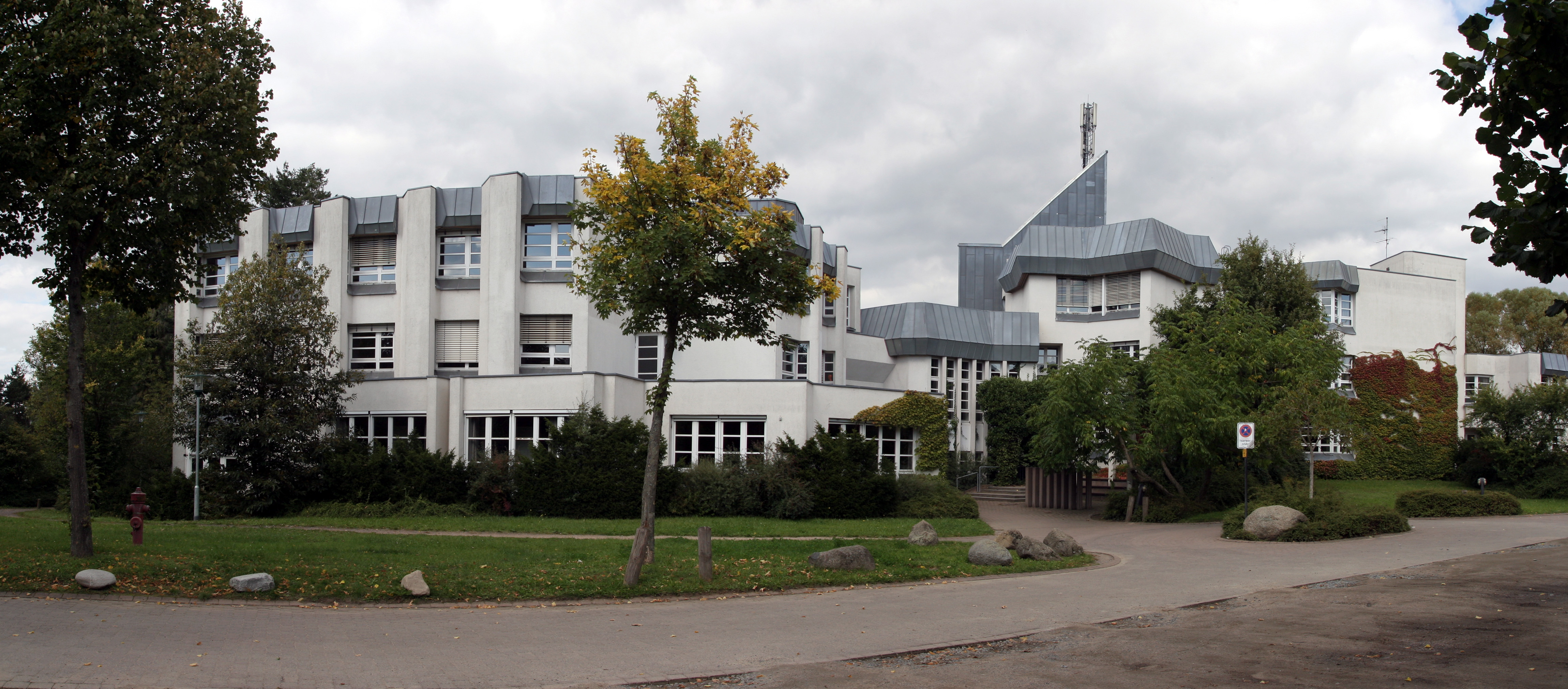 Die Akademie für Tonkunst in Darmstadt. Mit Hugin aus zwei Einzelaufnahmen zusammengesetzt.